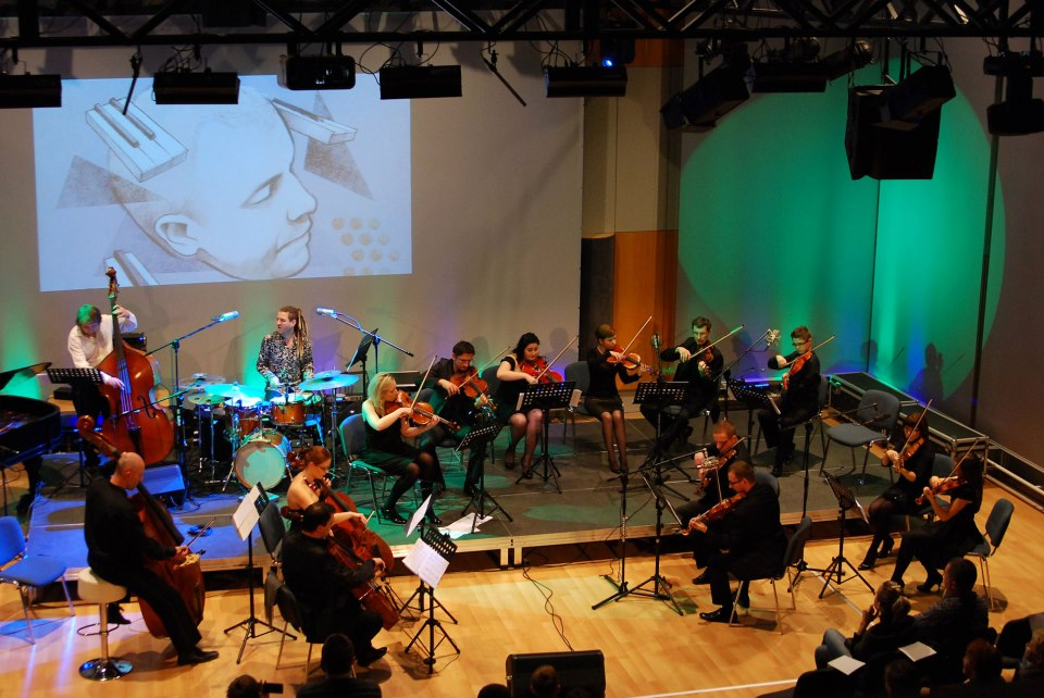 Baltic Neopolis Orchestra podczas koncertu "Włącz Orkiestrę! Jazz i Orkiestra".